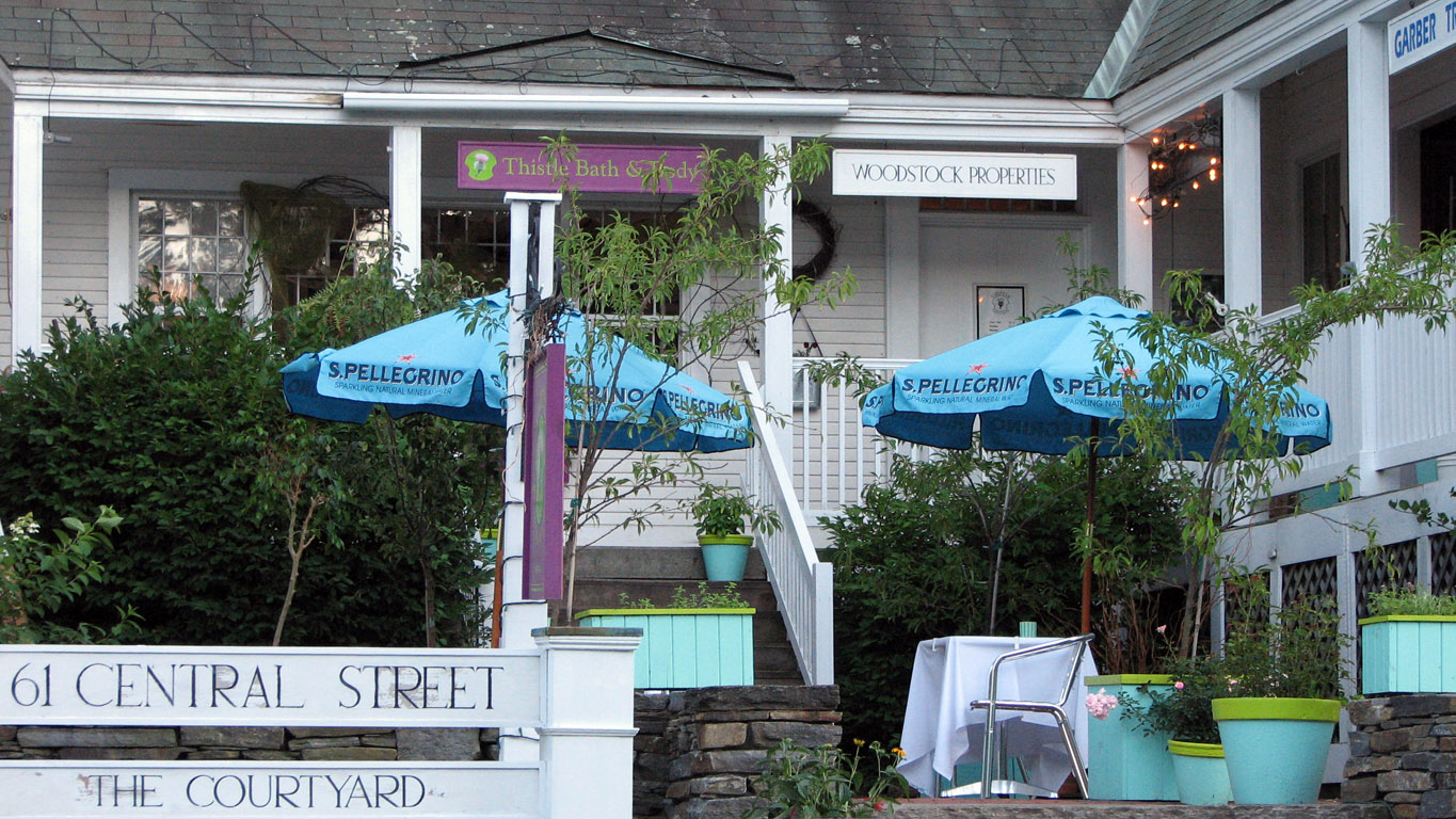 Кафе в Вудстоке